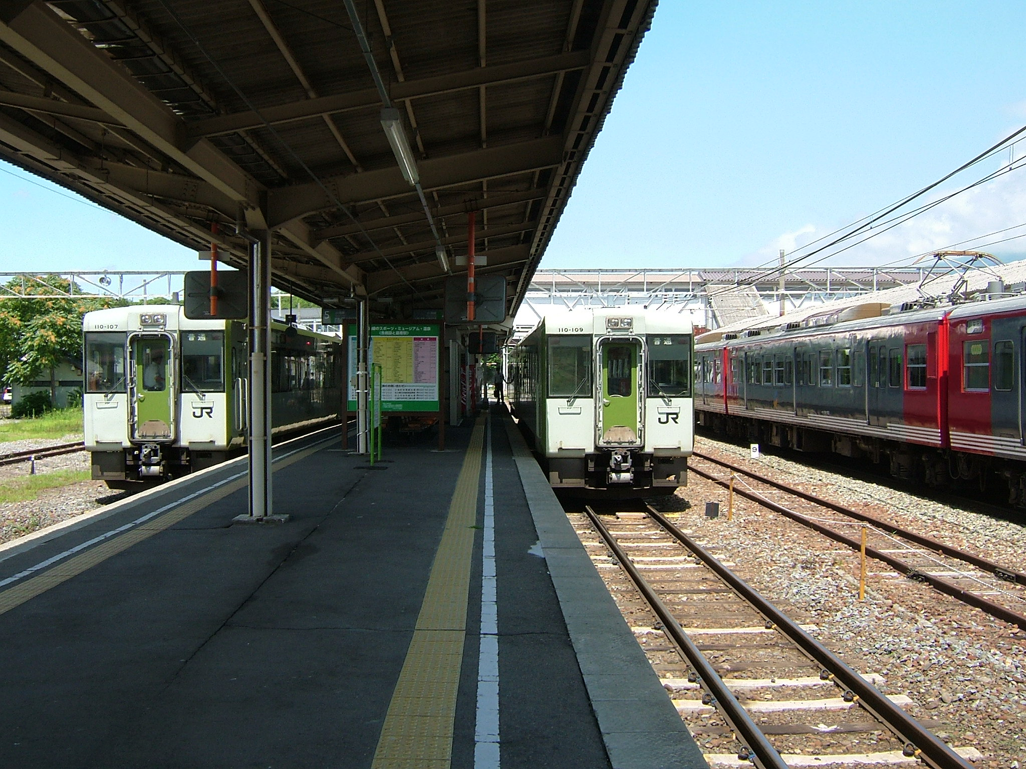 小諸駅小海線プラットホーム